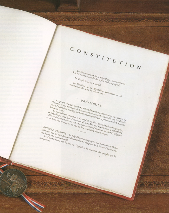 Image montrant la Constitution française avec le sceau de la République Française.